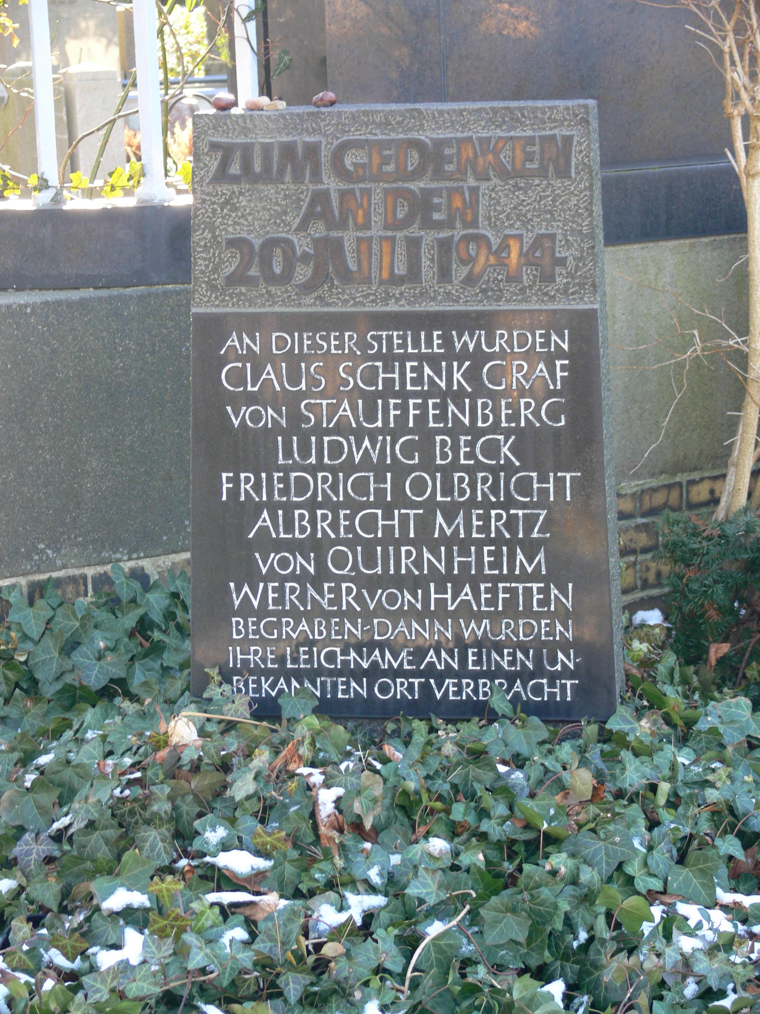 Alter St.-Matthäus-Kirchhof Berlin-Schöneberg Gedenkstein an der kurzzeitigen Grabstätte von Claus Schenk Graf von Stauffenberg, Ludwig Beck, Friedrich Olbricht, Albrecht Mertz von Quirnheim, Werner von Haeften